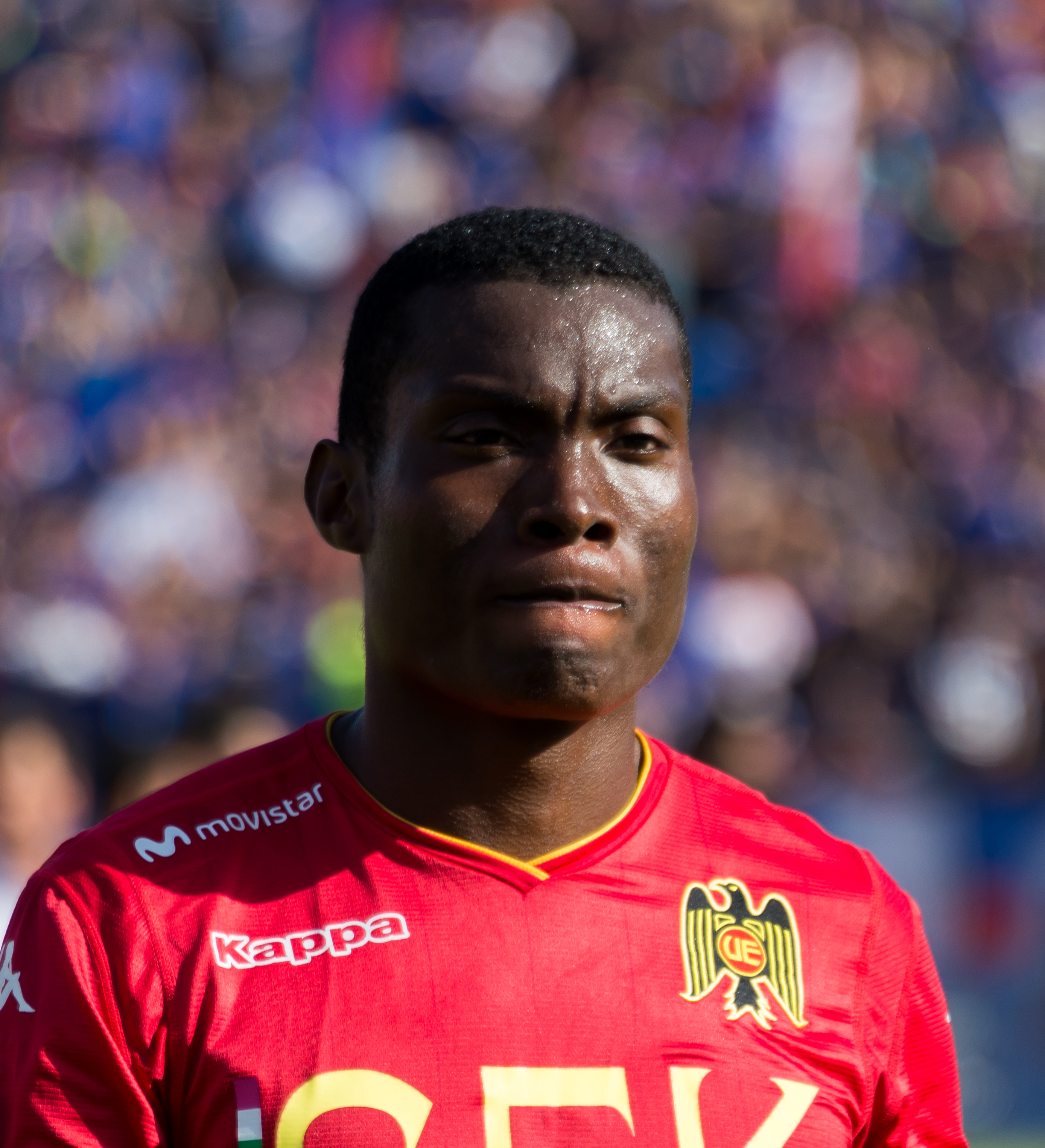 Ezequiel Palomeque, Universidad de Chile v Unión Española, Estadio Nacional Julio Martínez Prádanos, Ñuñoa, Santiago, Región Metropolitana, Chile.